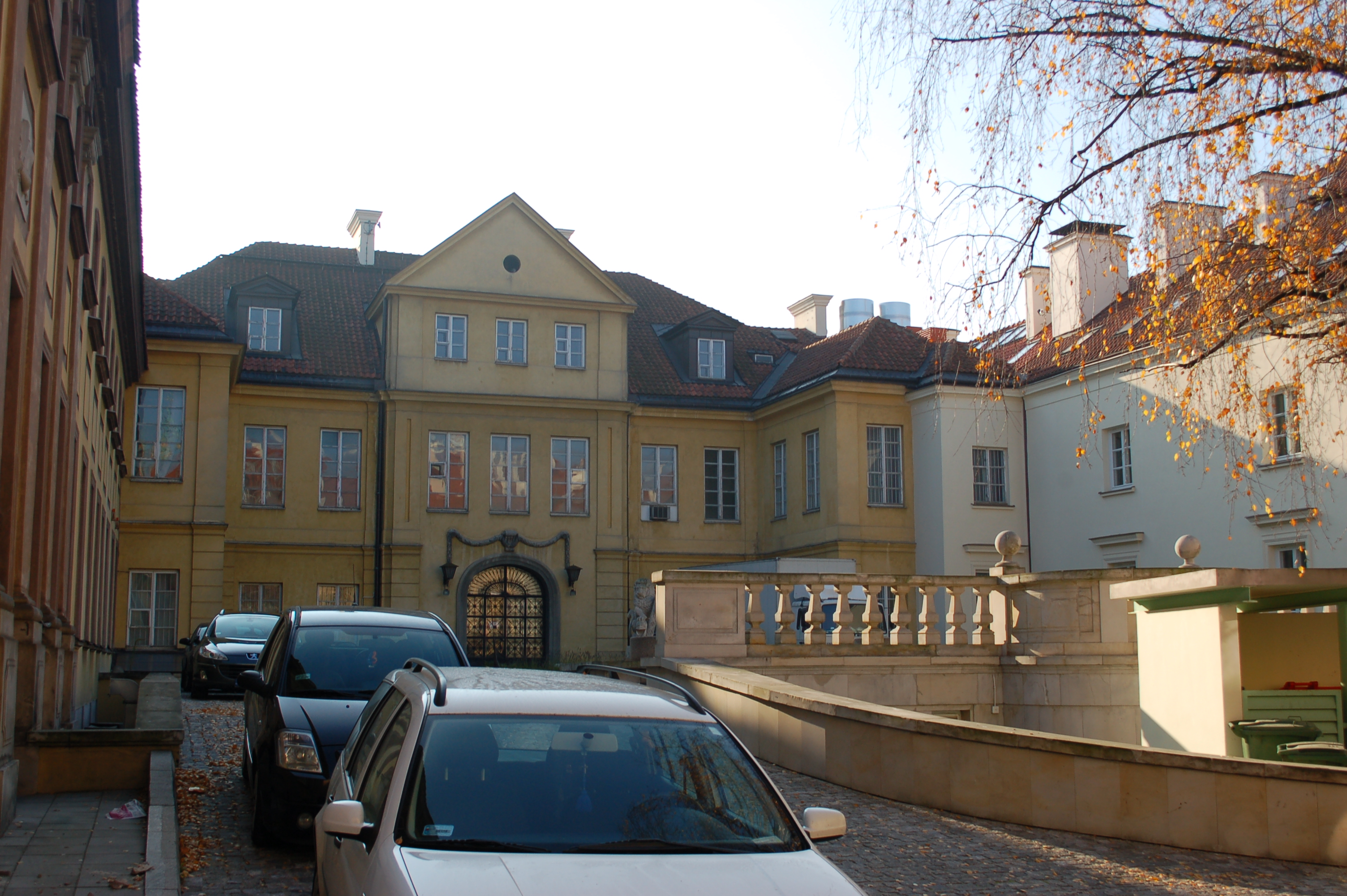 Warschau, Miodowa-Strasse